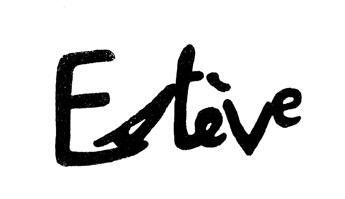 Signature du peintre Maurice Estève (scan d'une invitation d'exposition) This signature is believed to be ineligible for copyright and therefore in the public domain because it falls below the required level of originality for copyright protection both in the United States and in the source country (if different). In this case, the source country (e.g. the country of nationality of the signatory) is believed to be France. Cette image ou le texte qui y est représenté est seulement composé de formes géométriques simples et de texte. Elle n’atteint pas le seuil d'originalité nécessaire pour la protection du droit d’auteur, et est donc du domaine public. See autographs of Magritte and Picasso